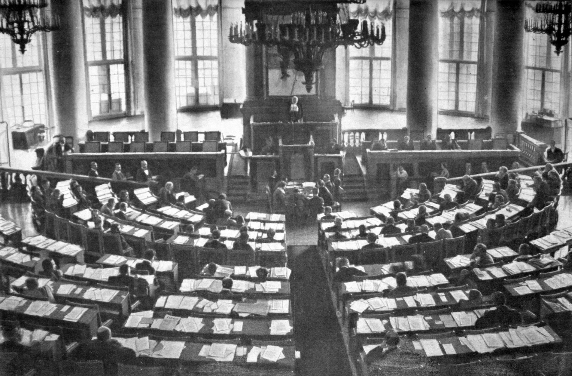 Зал заседаний государственной думы 1906-1917 года